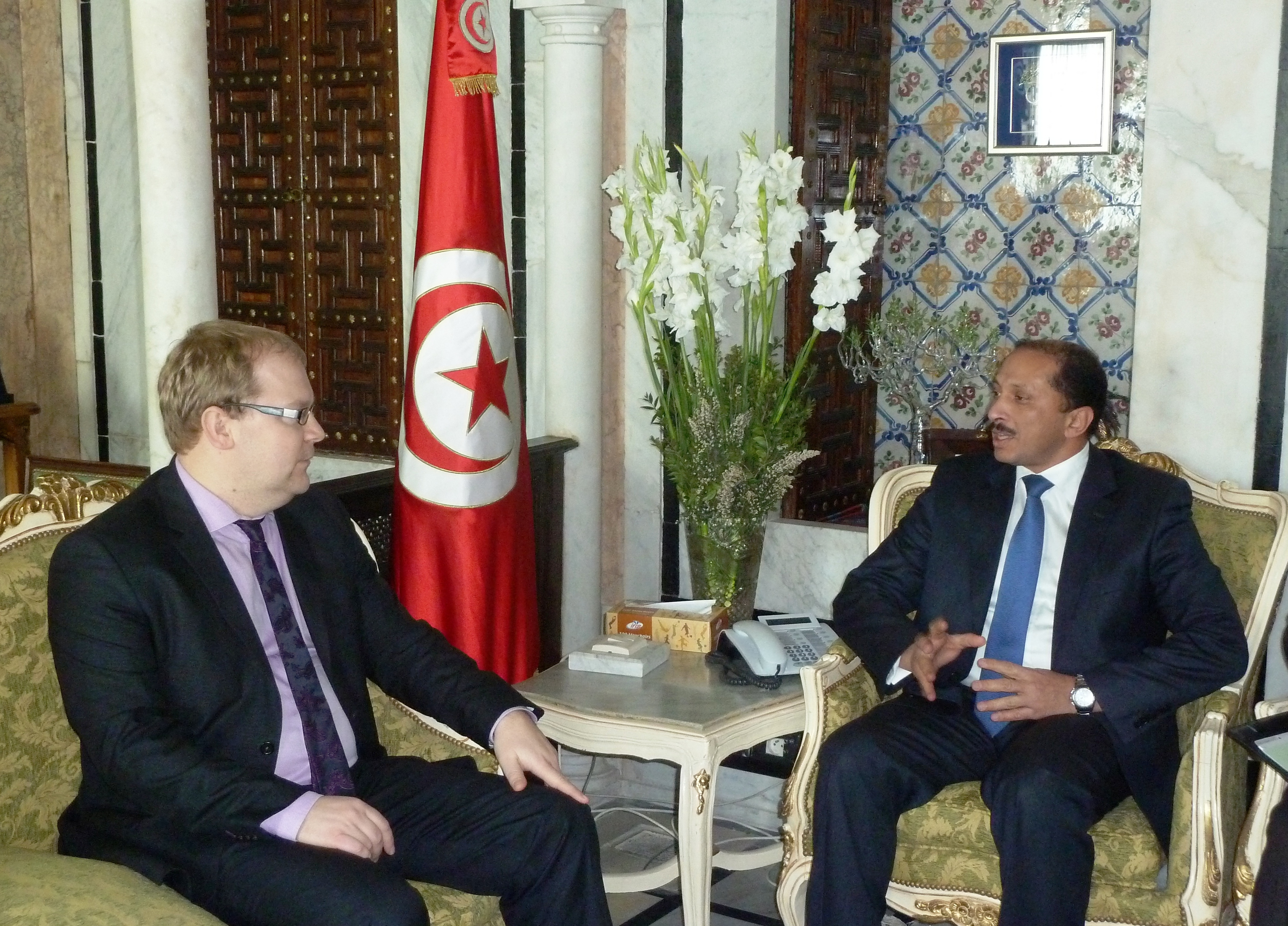 Välisminister Urmas Paet kohtus Tunises Tuneesia avaliku halduse reformi ministri Mohamed Abbouga. 14. märts 2012